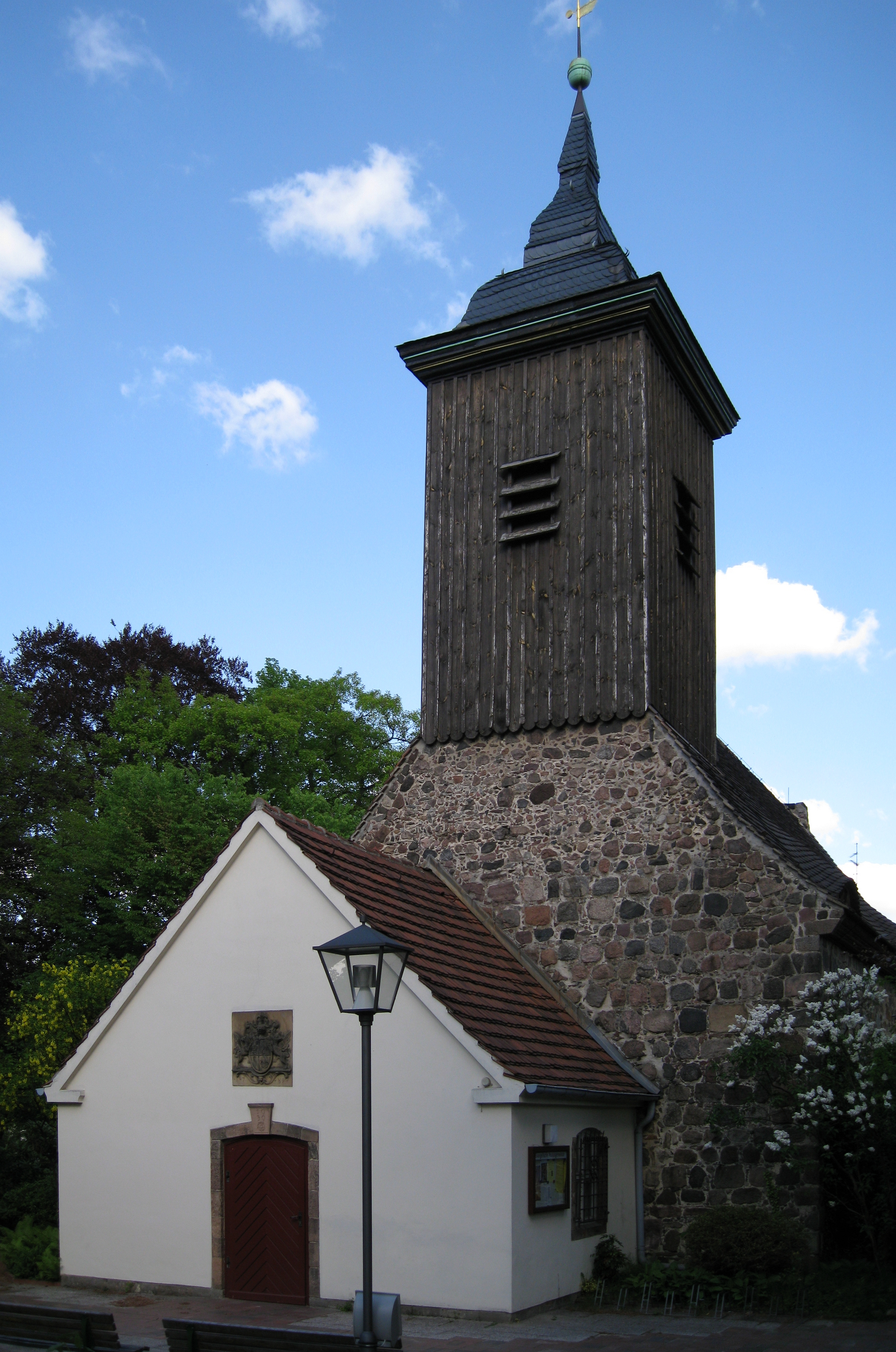 Dorfkirche Lichterfelde mit der zur Eingangshalle umgebauten Gruft